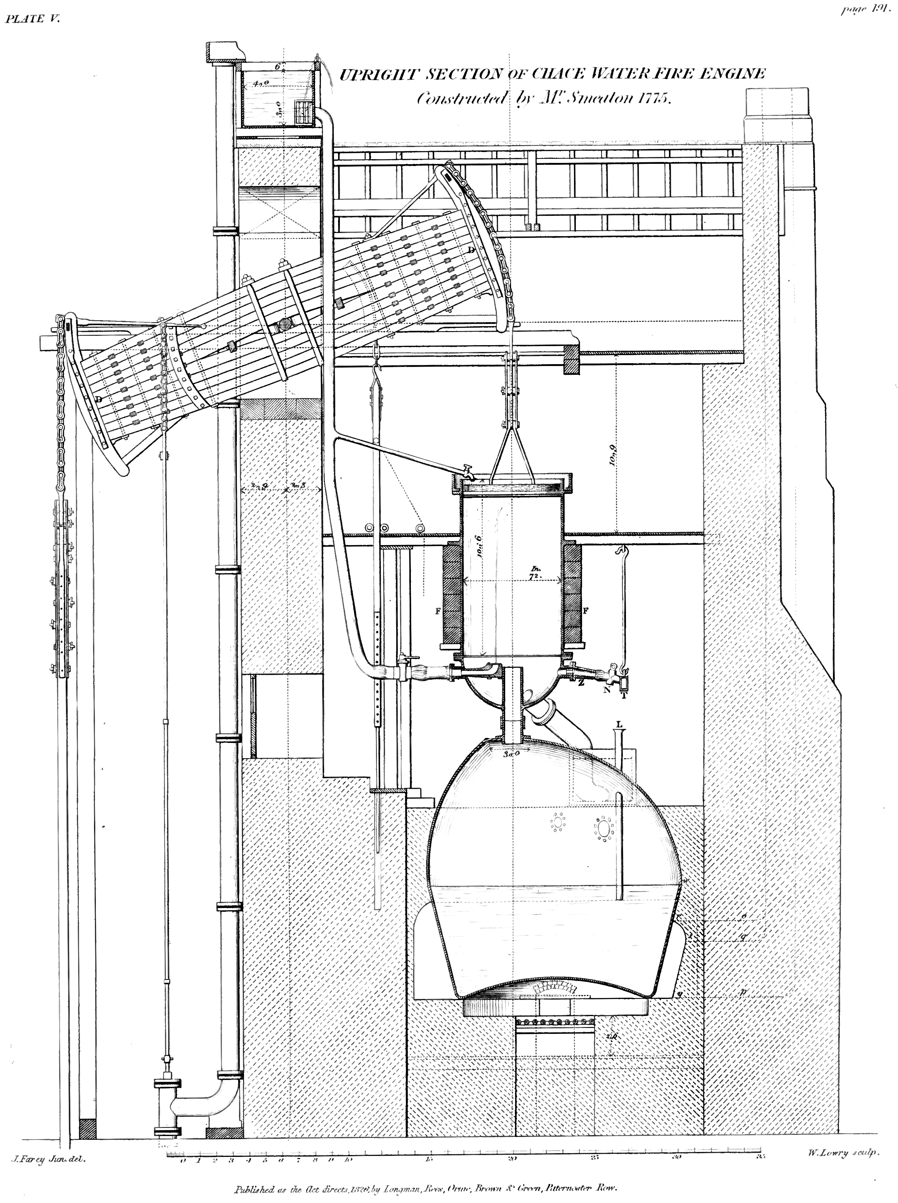 John Smeaton により1775年にコーンウォール州チェイス・ウォーター鉱山で建造されたニューコメン機関の断面図